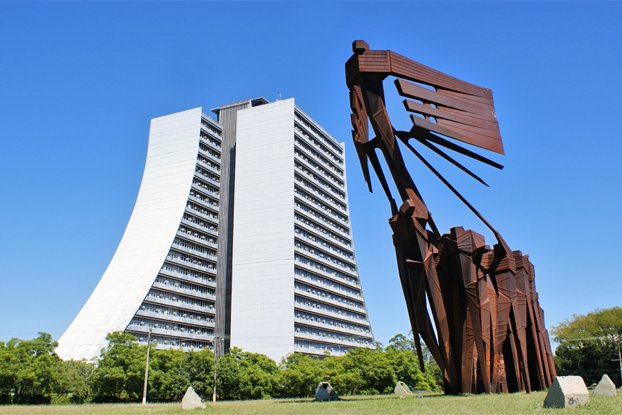 Centro Administativo Monumento aos Açorianos Porto Alegre, 2011